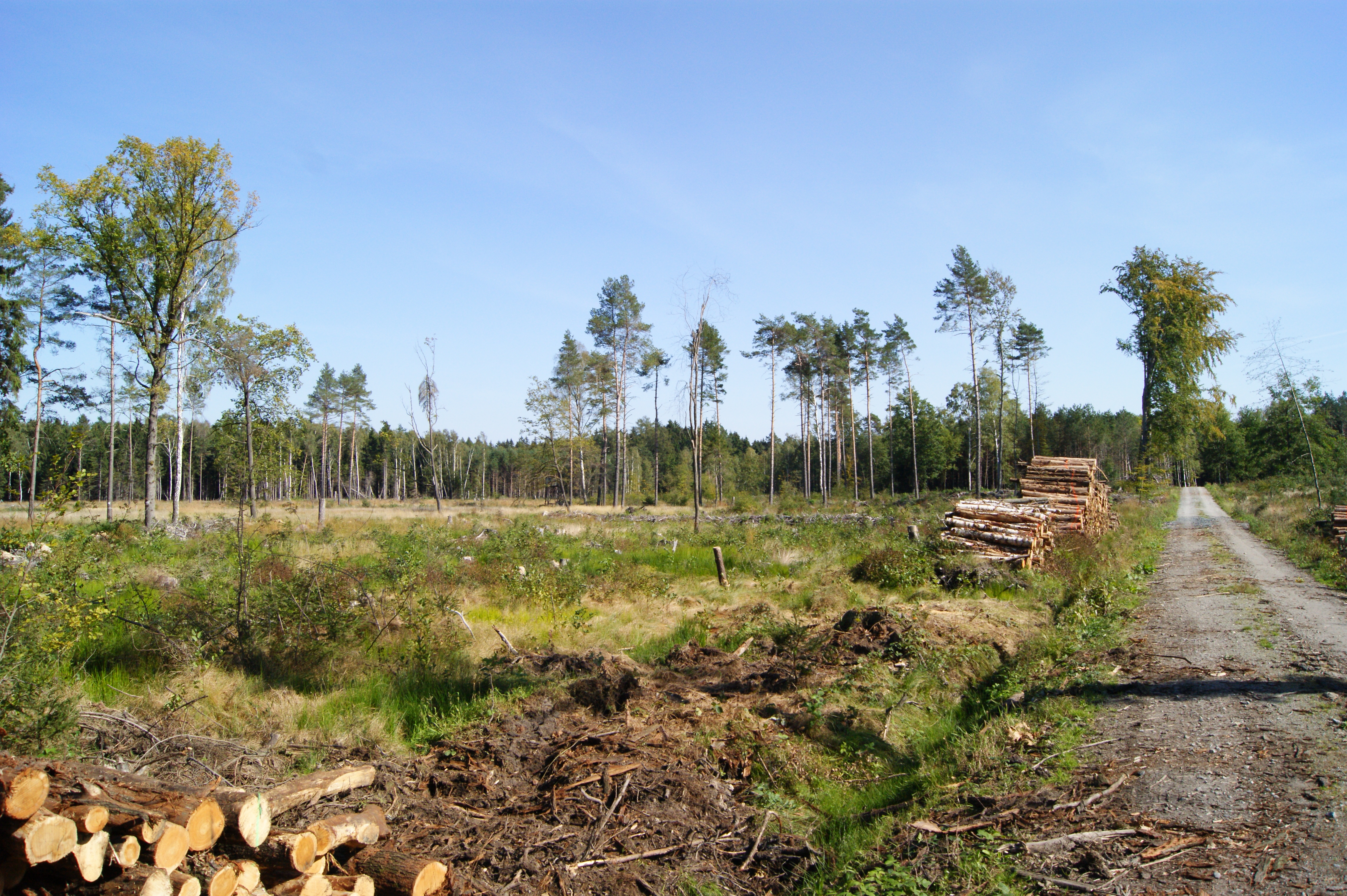 Langer Flügel zwischen Großröhrsdorf und Pulsnitz (Waldstück Niederforst)